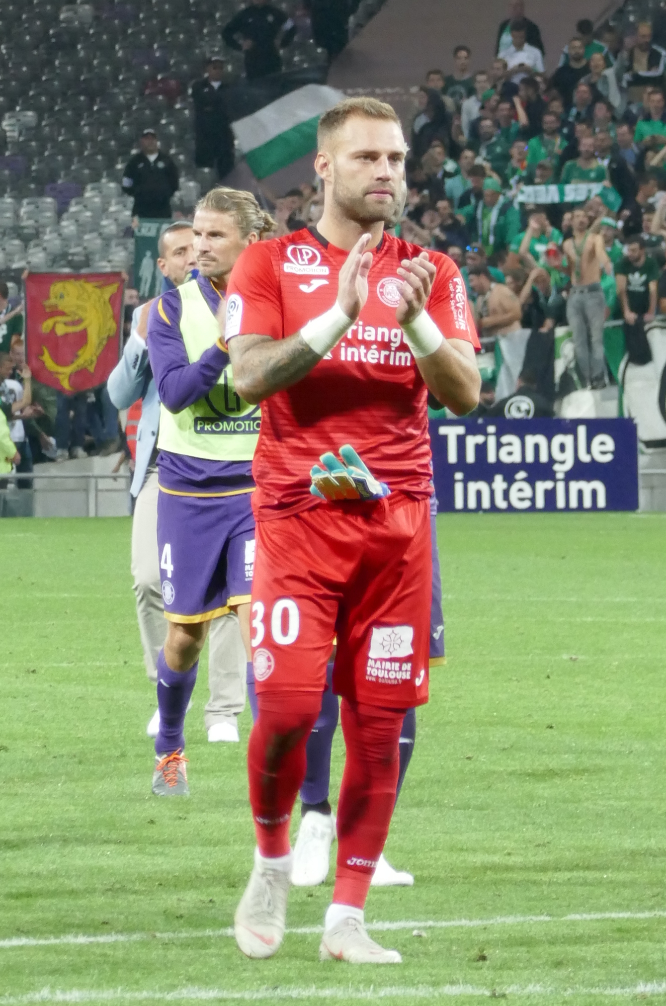 Baptiste Reynet sous les couleurs du TFC après le match TFC-ASSE comptant pour la 7ème journée de Ligue 1 2018-2019.